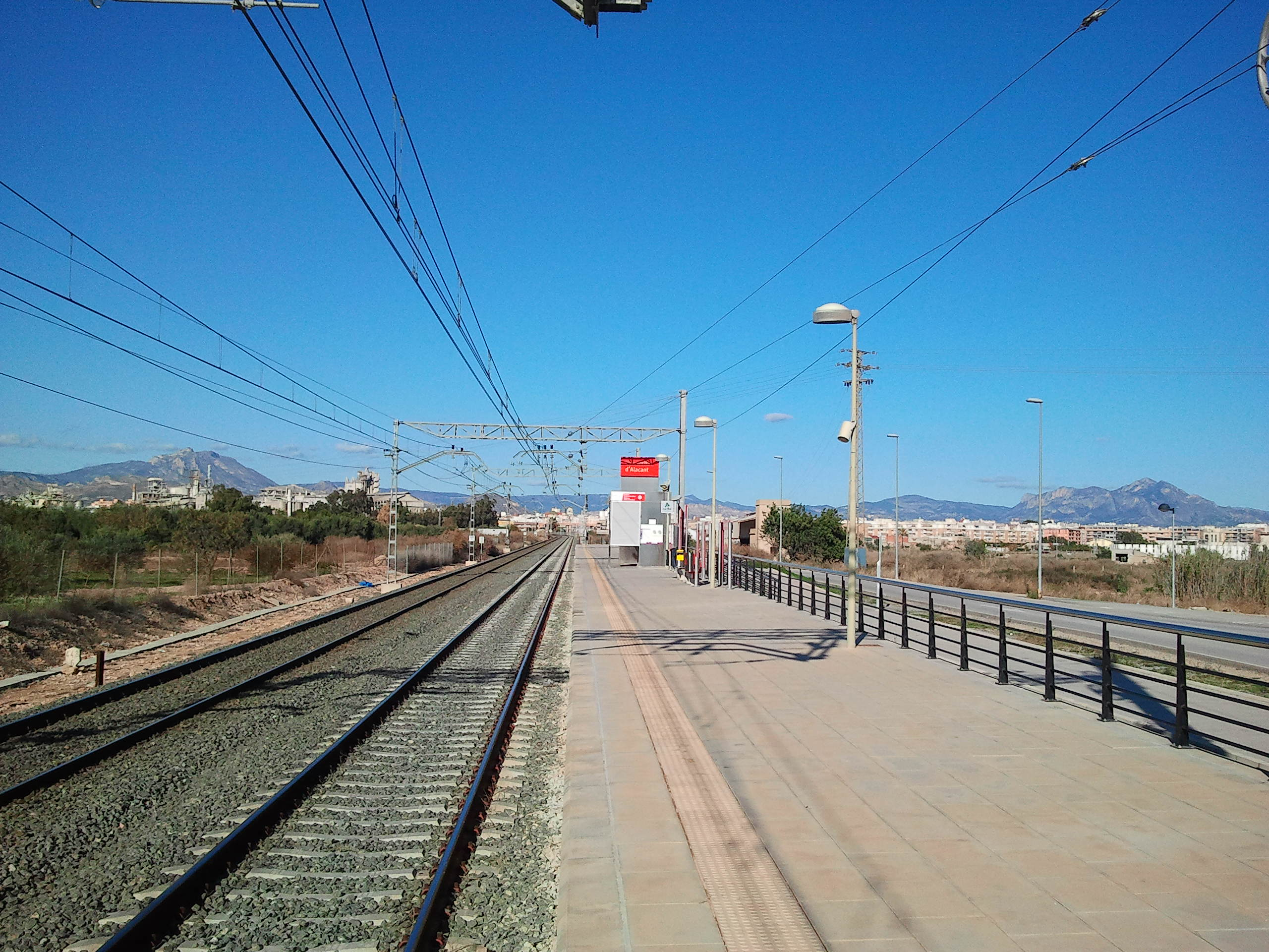 Apeadero Universidad de Alicante, Renfe Cercanías Murcia/Alicante